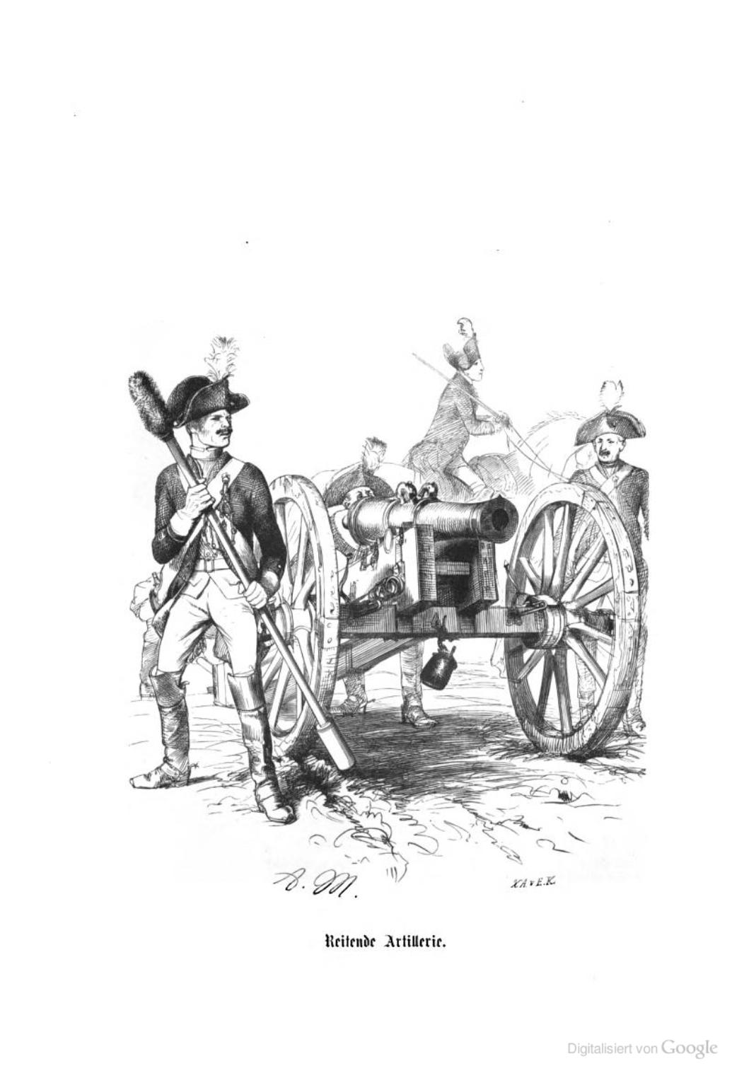 preußischer berittene Artillerie, in Uniformen um 1760